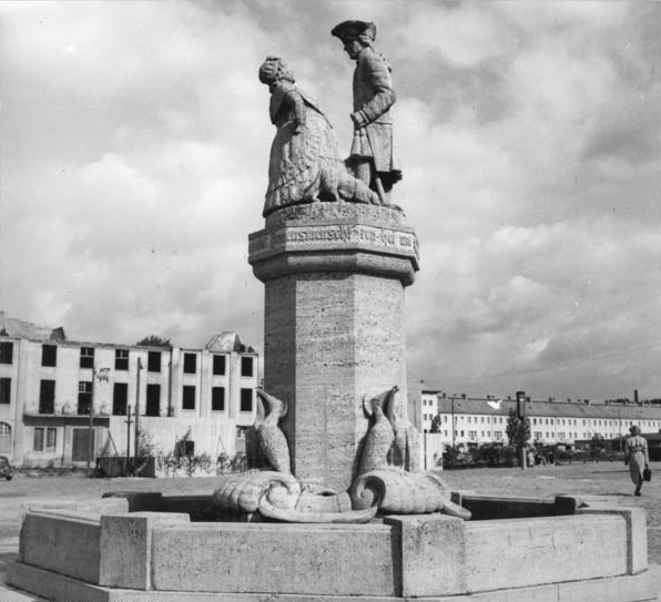 Neubrandenburg, "Durchläuchting Brunnen" ADN-ZB Klein Wji-Ho. 7.9.1954 Fritz Reuter-Gedenkstätten in Stavenhagen und Neubrandenburg Der "Durchläuchting Brunnen" auf dem Marktplatz in Neubrandenburg. Reuter hat längere Zeit in Neubrandenburg gearbeitet, bevor er nach Eisenach umzog.